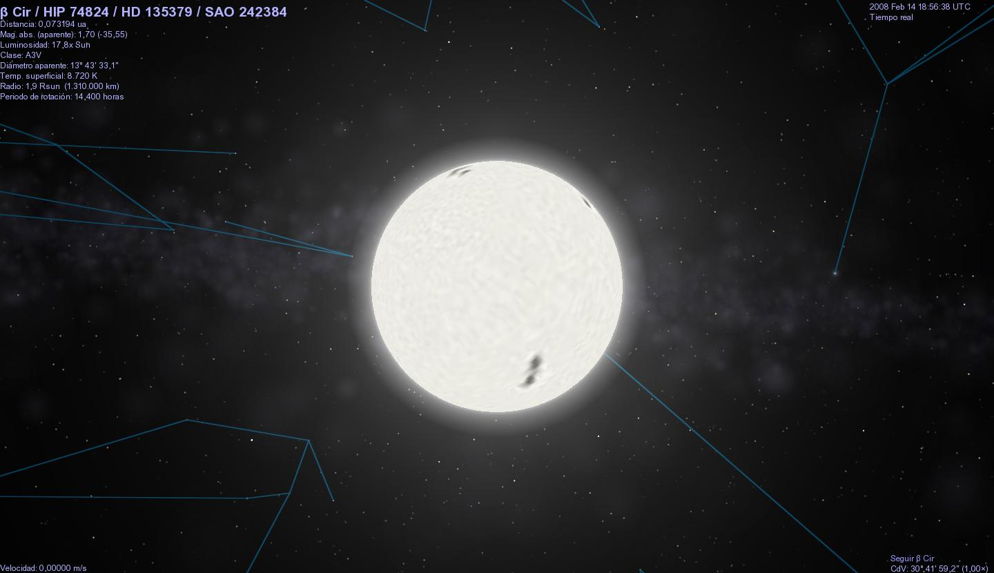 Imagen de un programa de computadora , de la estrella Beta Circinus (Computer-generated image of the star Beta Circini).